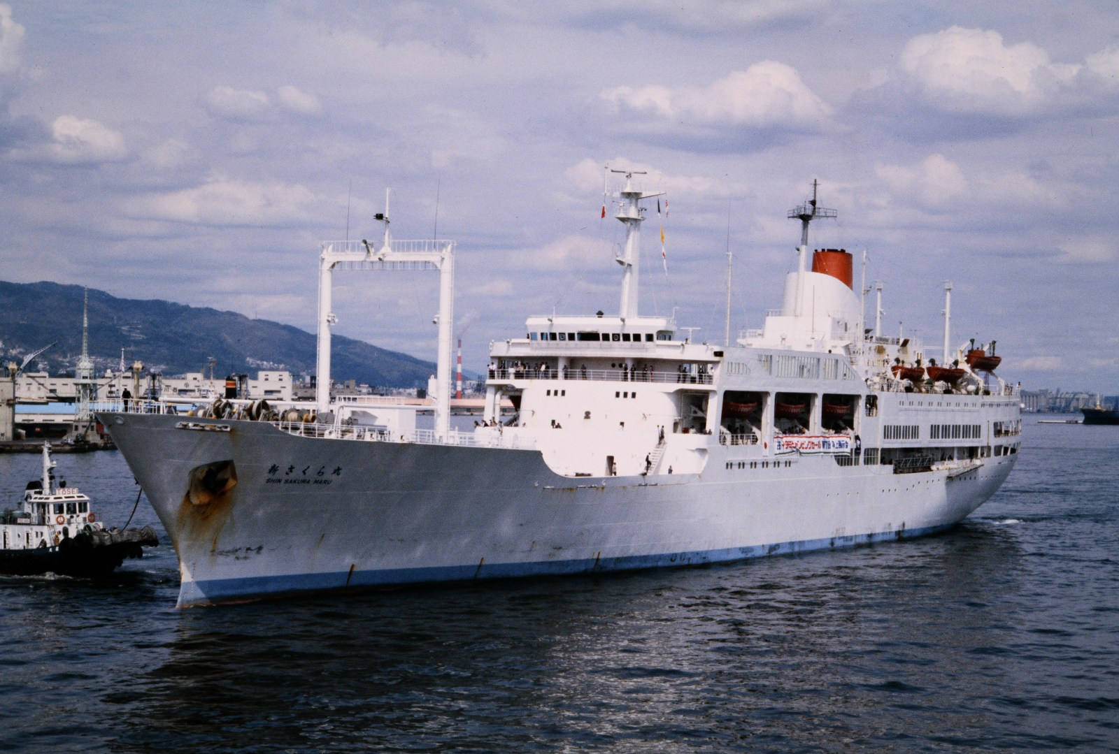 神戸港新港第四突堤に接岸する商船三井客船・新さくら丸